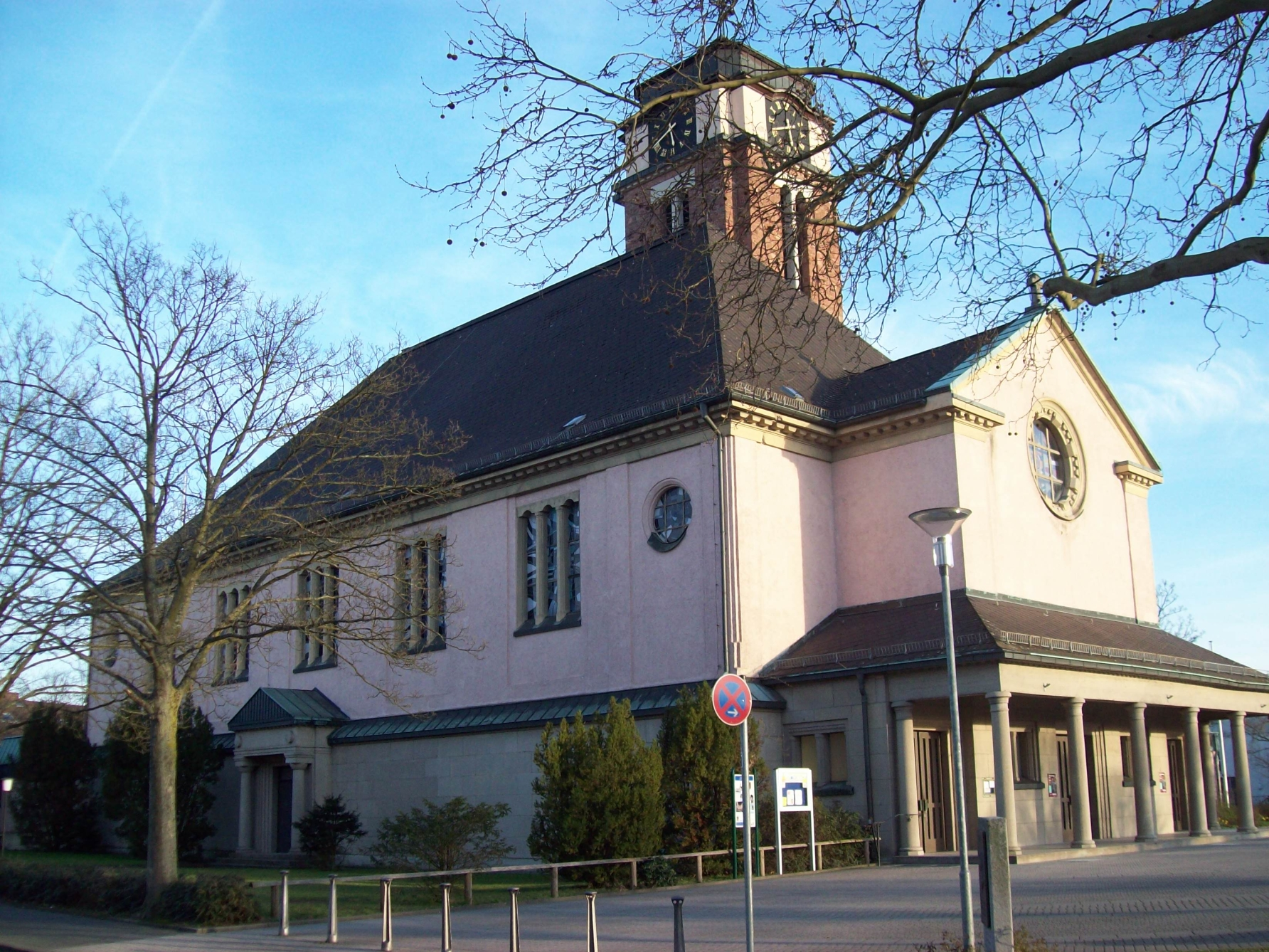 katholische Kirche St. Laurentius in Aschaffenburg-Leider, Aufnahme von Nordwesten